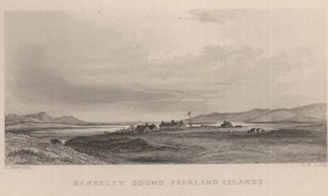 Casas de Puerto Soledad en Malvinas, 1833 en una litografía del libro de Darwin. El dibujante era Conrad Martens.